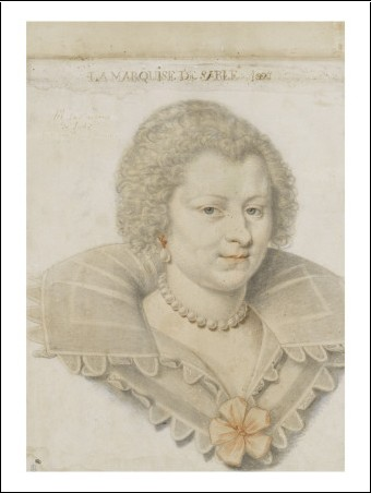 Madeleine de Souvré, marquise de Sablé